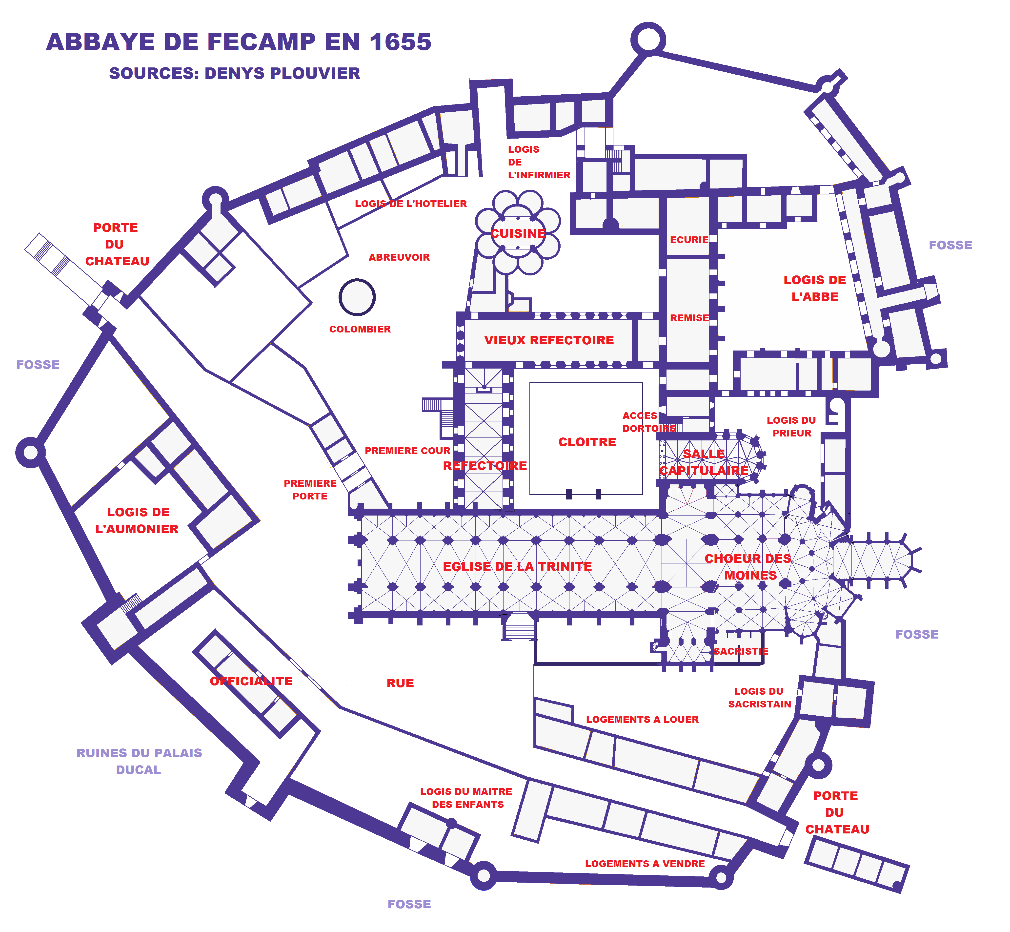 Abbaye de Fécamp, plan de Denys Plouvier, 1655